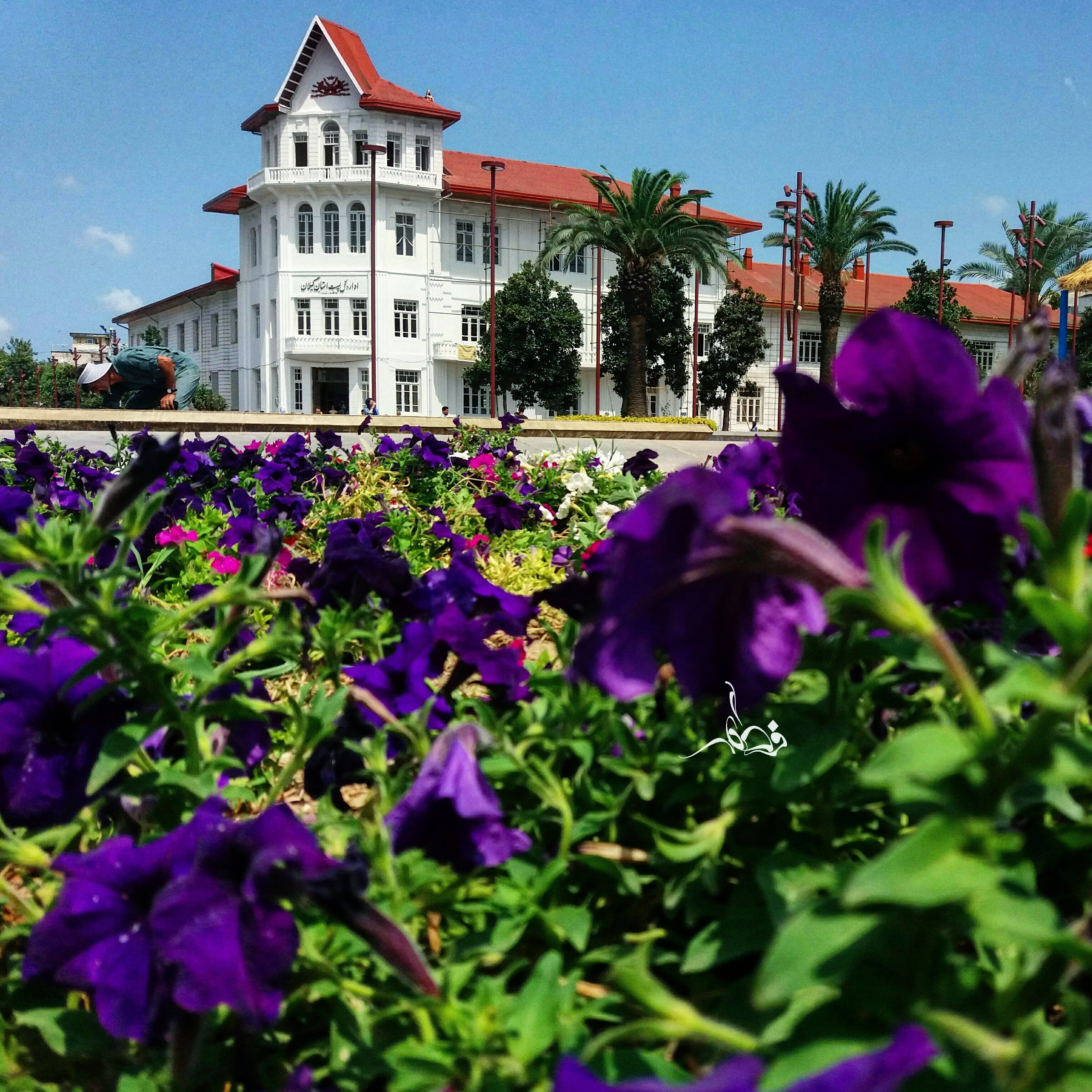 اداره پست